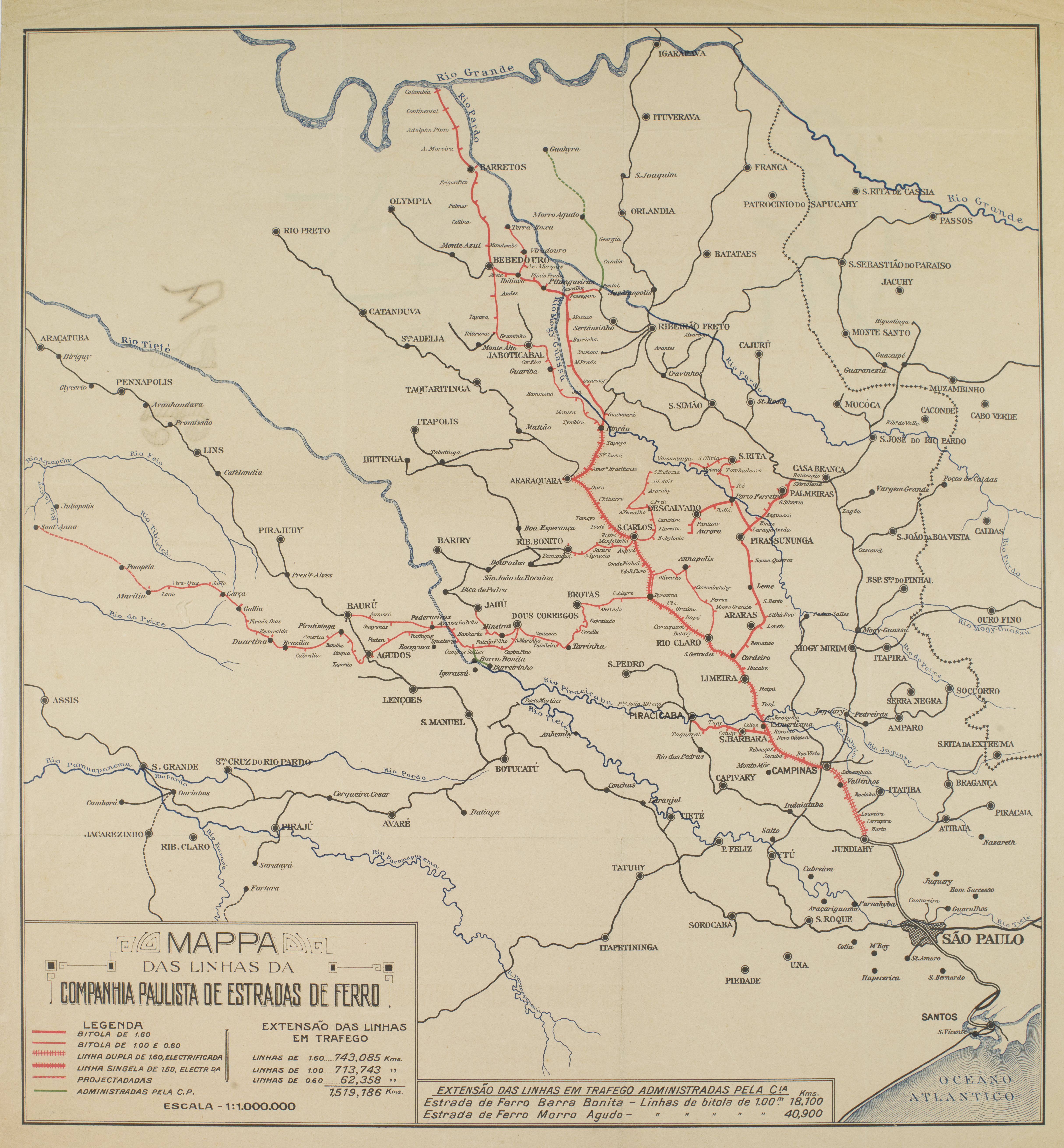 Obra que integra o acervo do Museu Paulista da USP. Coleção João Baptista de Campos Aguirra